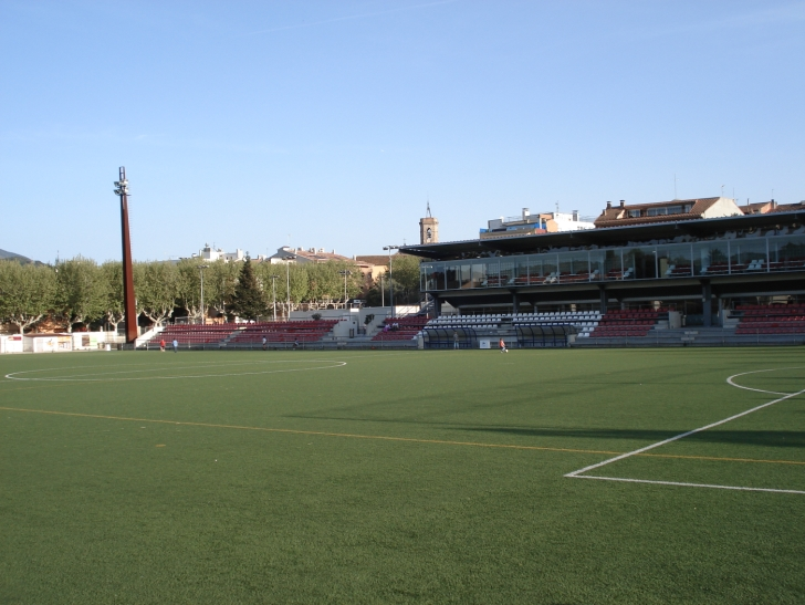 instalacions esportives (futbol) sant celoni